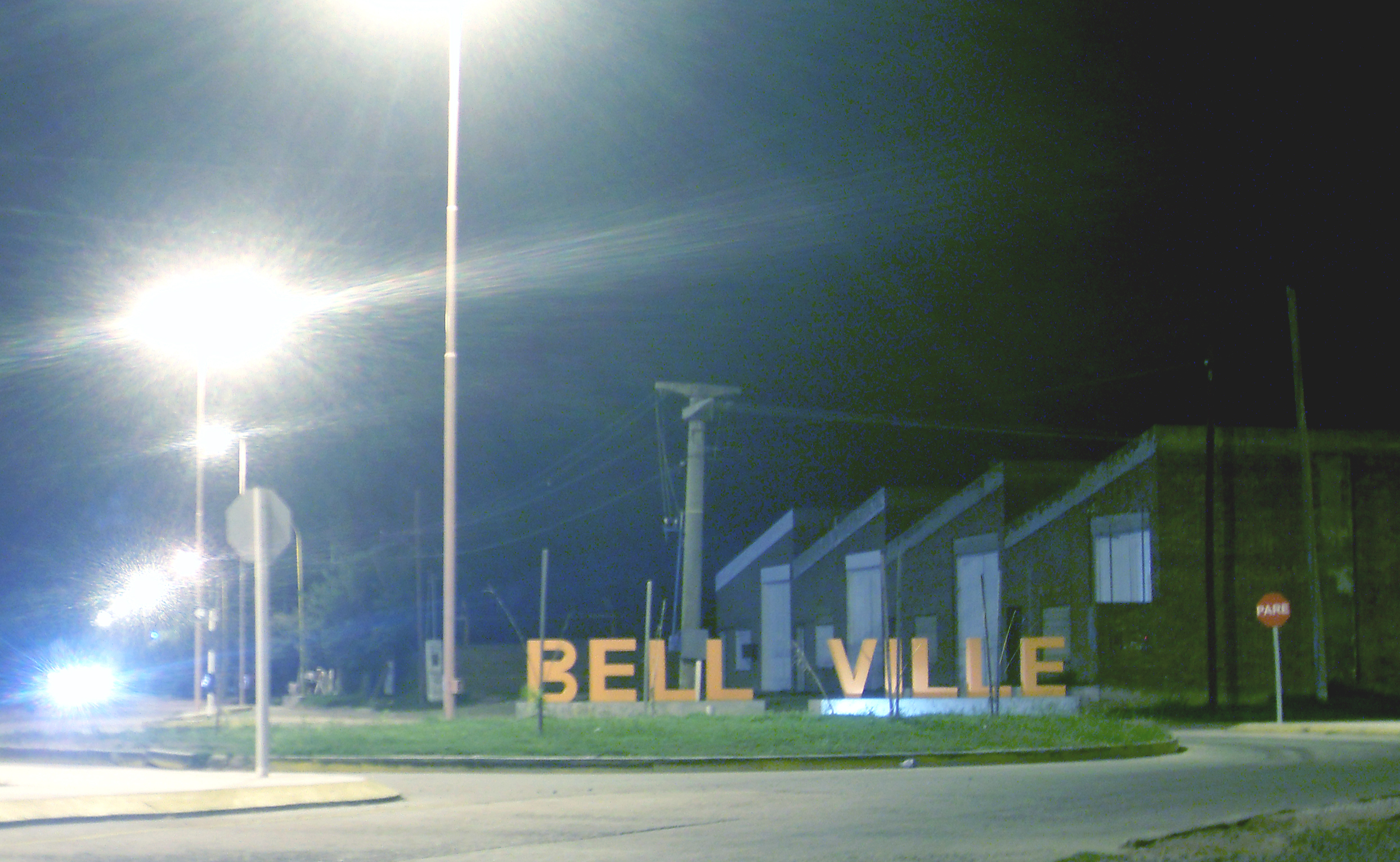 Acceso Sur